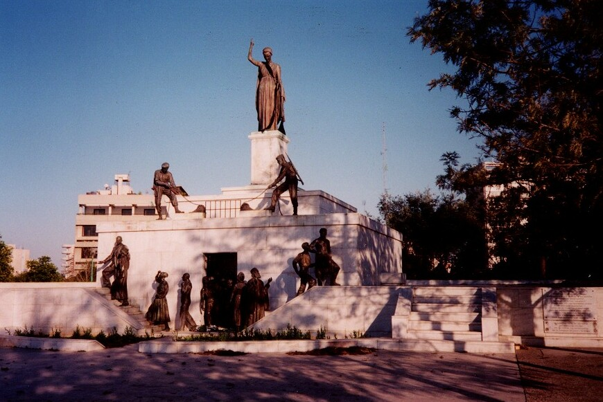 Monumento de la Guerra de la Independencia. Nicosia. Chipre. Imagen tomada por el cargador. Año 1998.